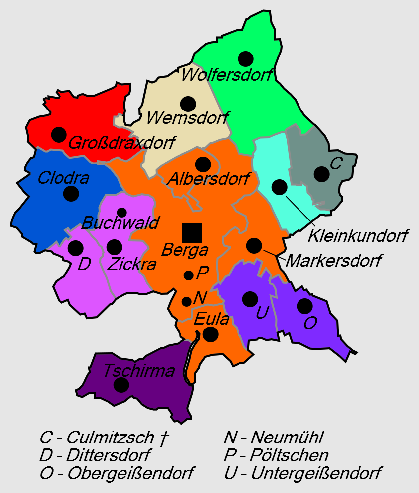 Gliederung der Stadt Berga/Elster ab 1. Juli 1961